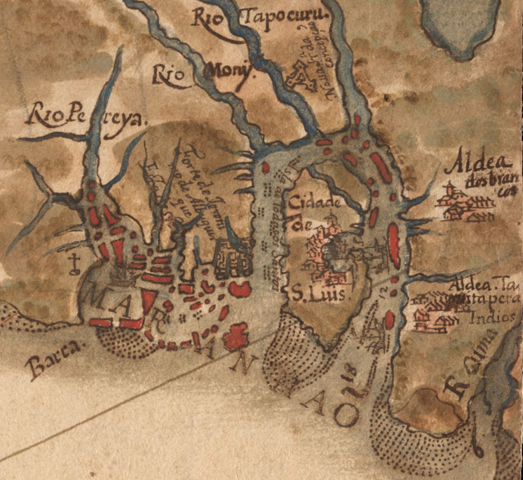 Imagem parcial do "Pequeno atlas do Maranhão e Grão-Pará" mostrando apenas a Cidade de São Luis e arredores